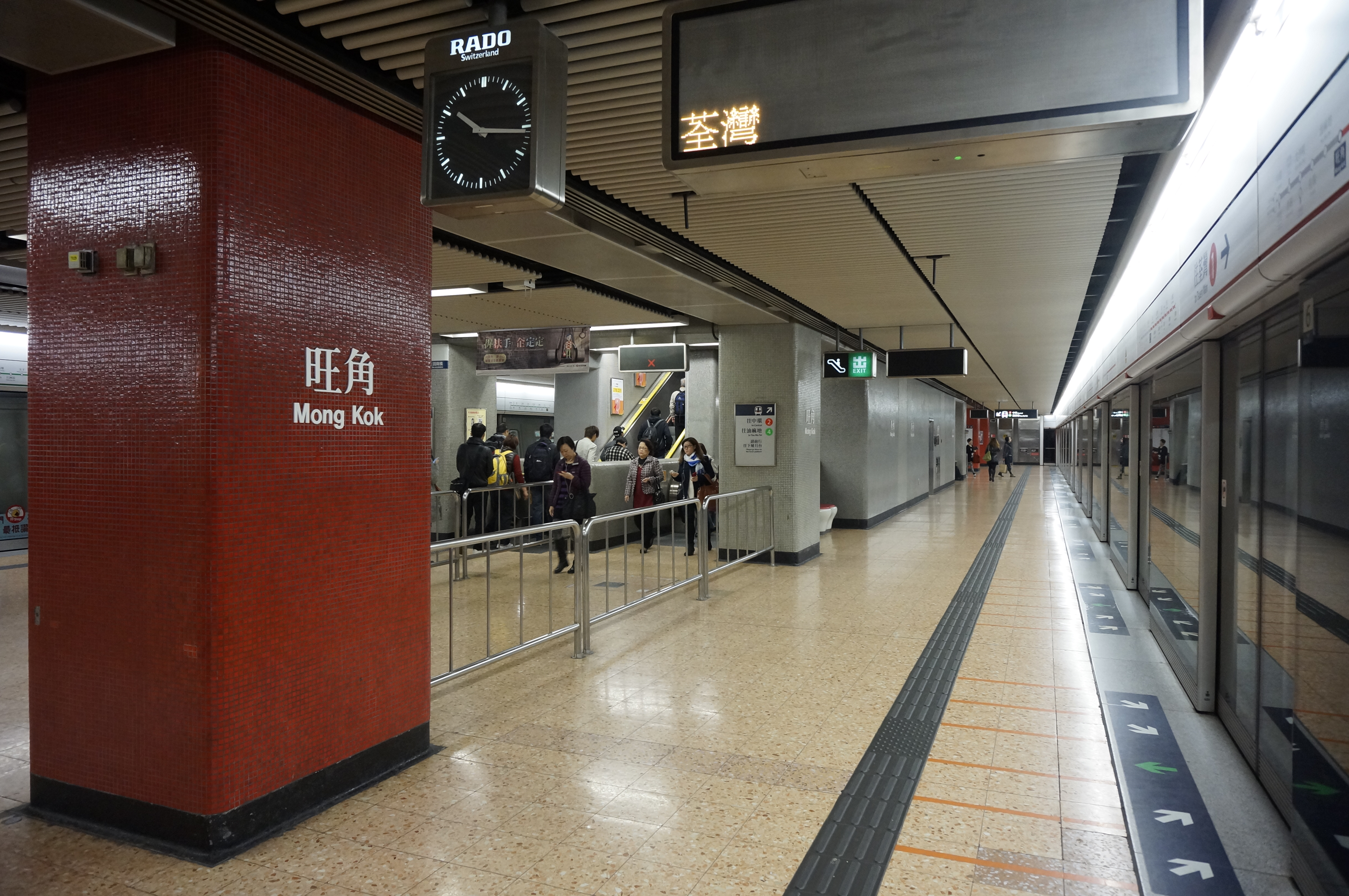 港鐵旺角站月台